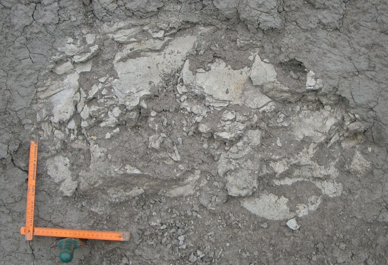 Septarie im Rupelton des Tagebaus Amsdorf.